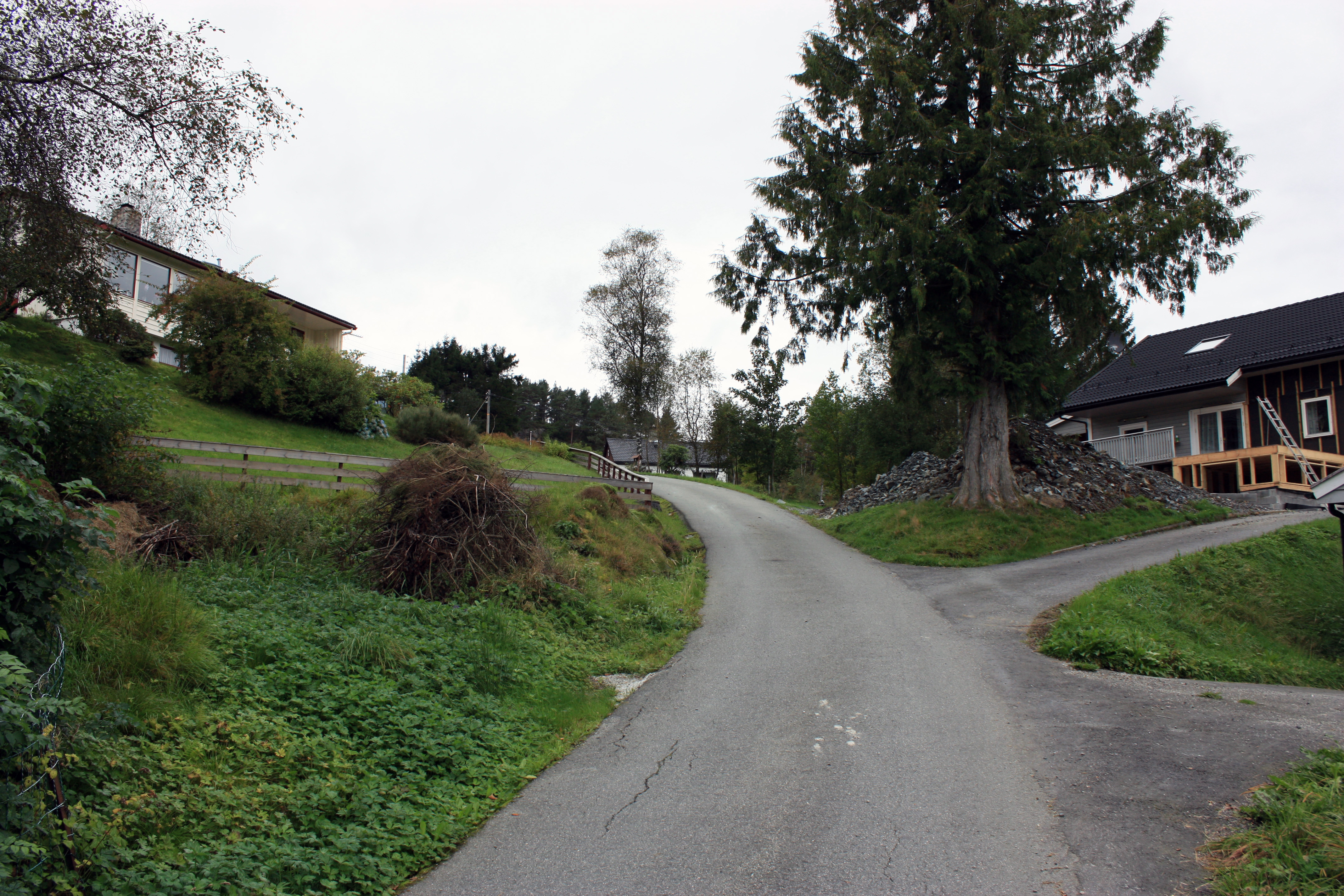 Fortunbakkane, Fana, Bergen, Norway